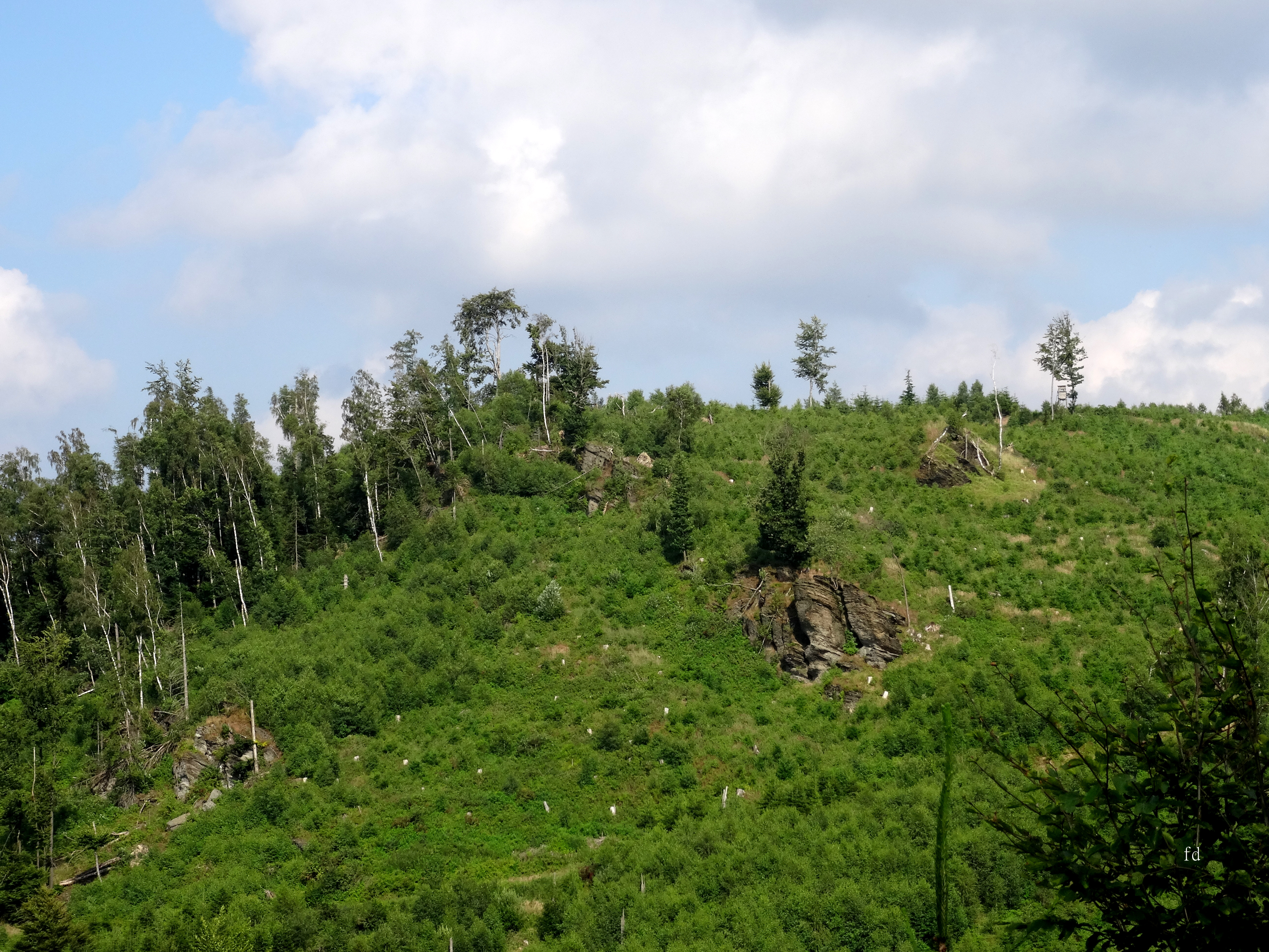 Landschaft mit Felsen östlich von Meschede; Naturschutzgebiet „Drürerberg“